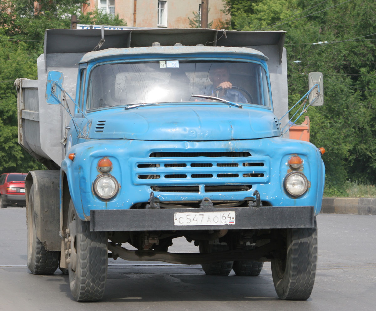 Самсосвал на базе ЗИЛ-130 в Саратове